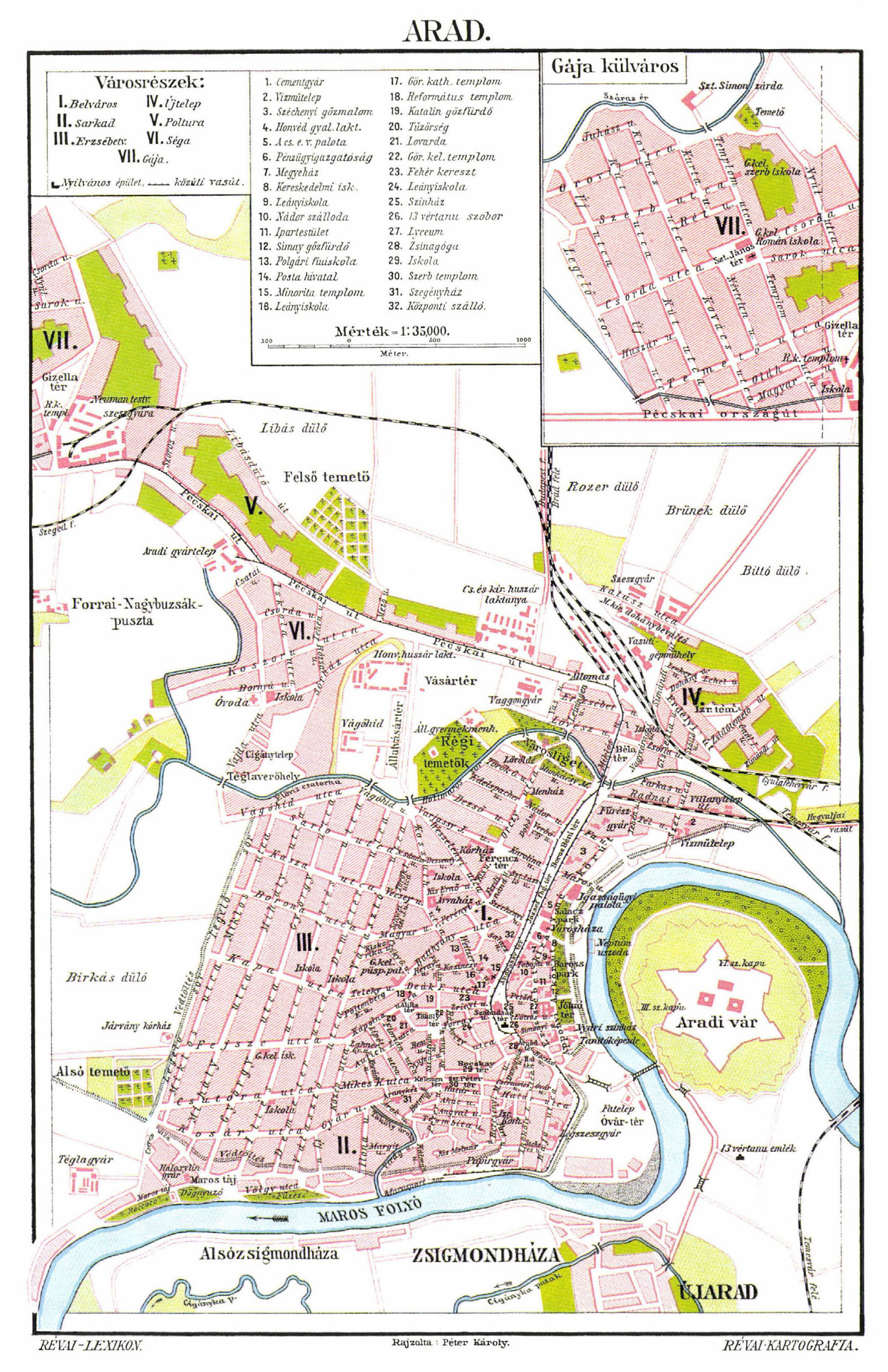 Révai Lexikon, Rajzolta: Péter Károly